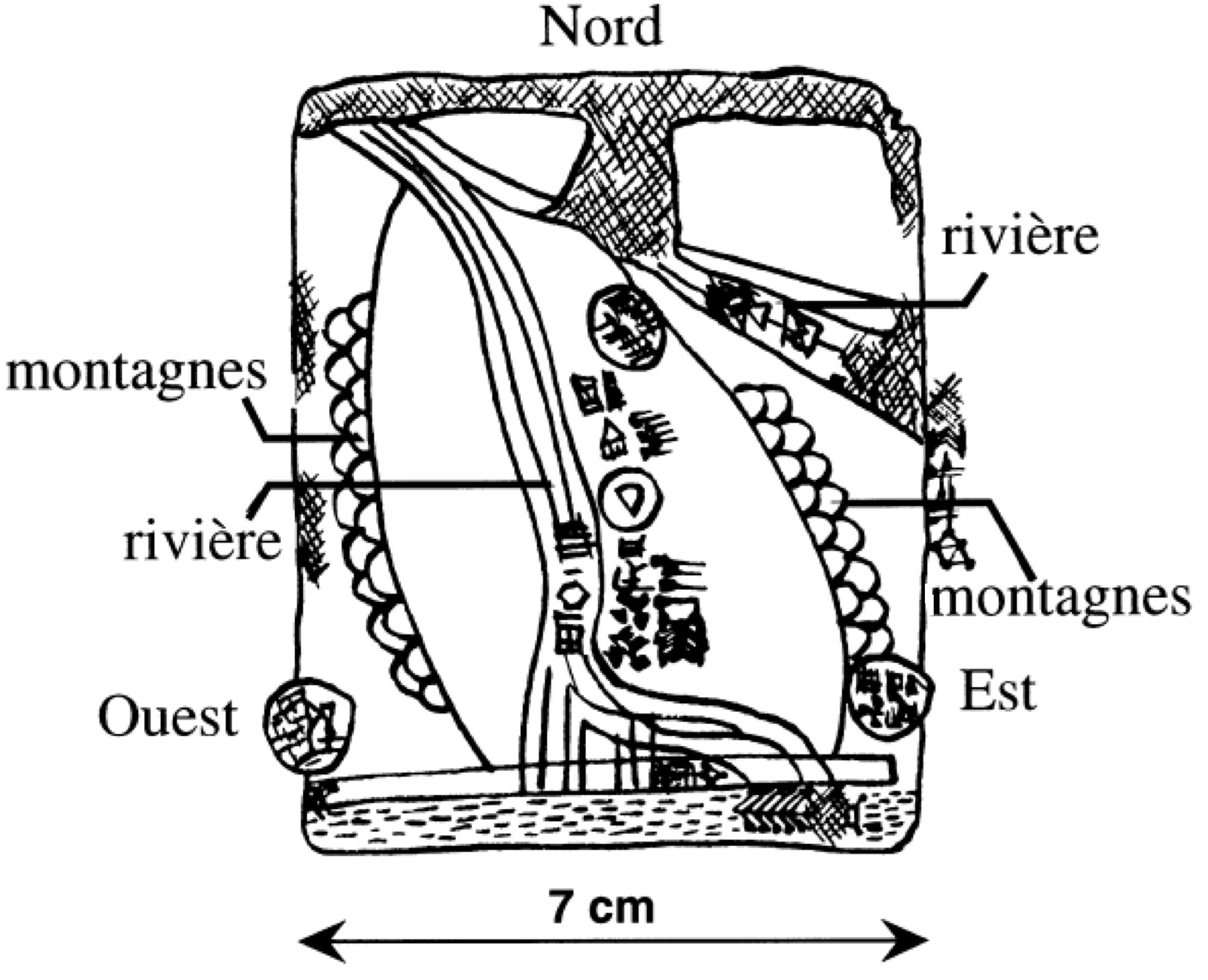 Esquisse explicative de la plus ancienne carte géographique connue. La carte figure sur une tablette d'argile sumérienne provenant des fouilles de Ga-Sur à Nuzi (Irak). La tablette est datée de 2500 avant notre ère et est conservée au Musée Sémitique de l'Université de Harvard à Cambridge (Massachusetts, EUA).